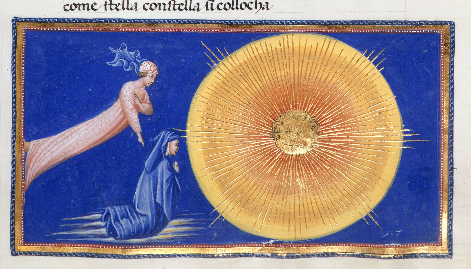 Giovanni di paolo, paradiso 51 la luce.jpg. Dante e Beatrice nel Cielo del Primum Mobile o Primo Mobile (Canto XXVIII)